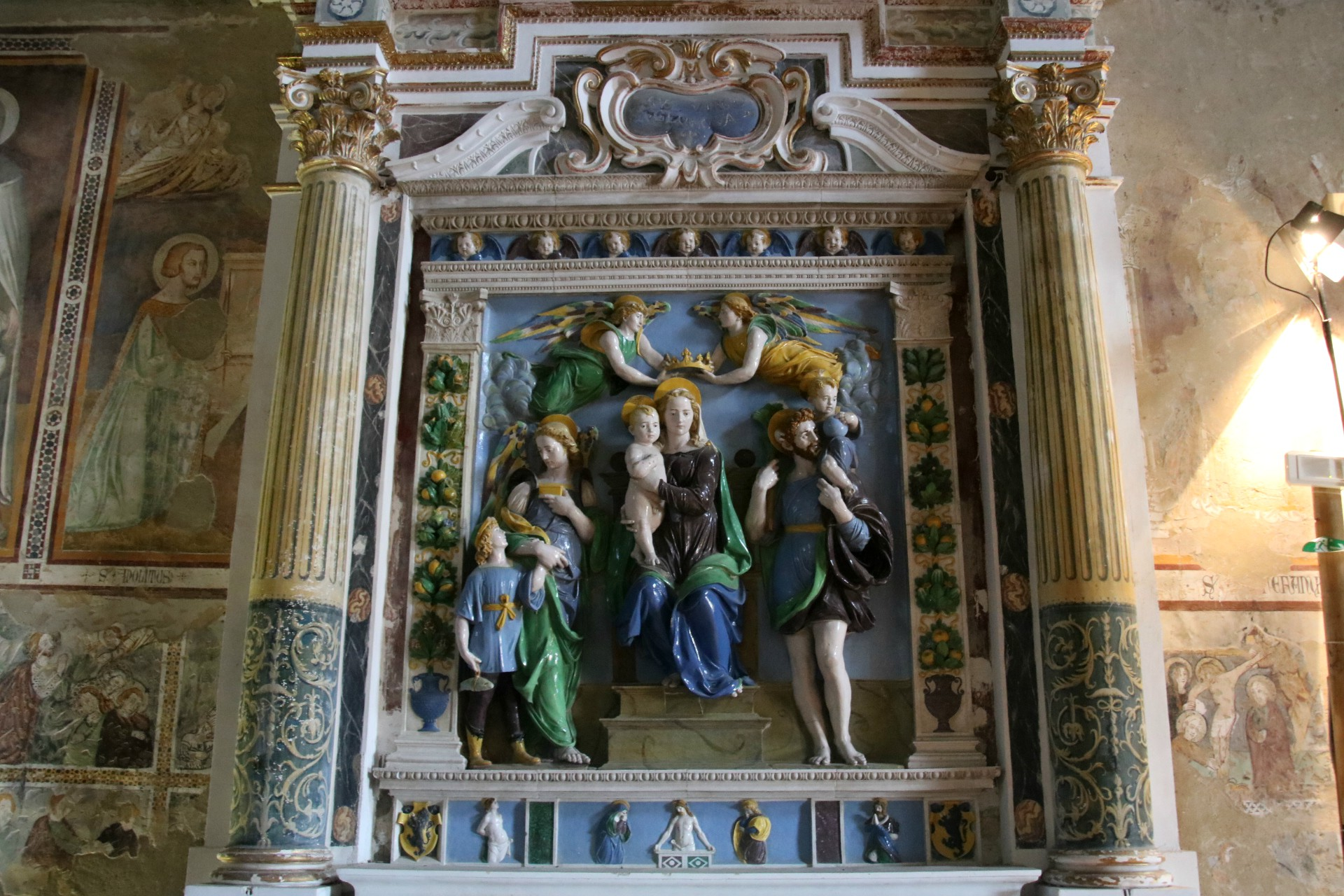 Chiesa di San Francesco (Asciano)